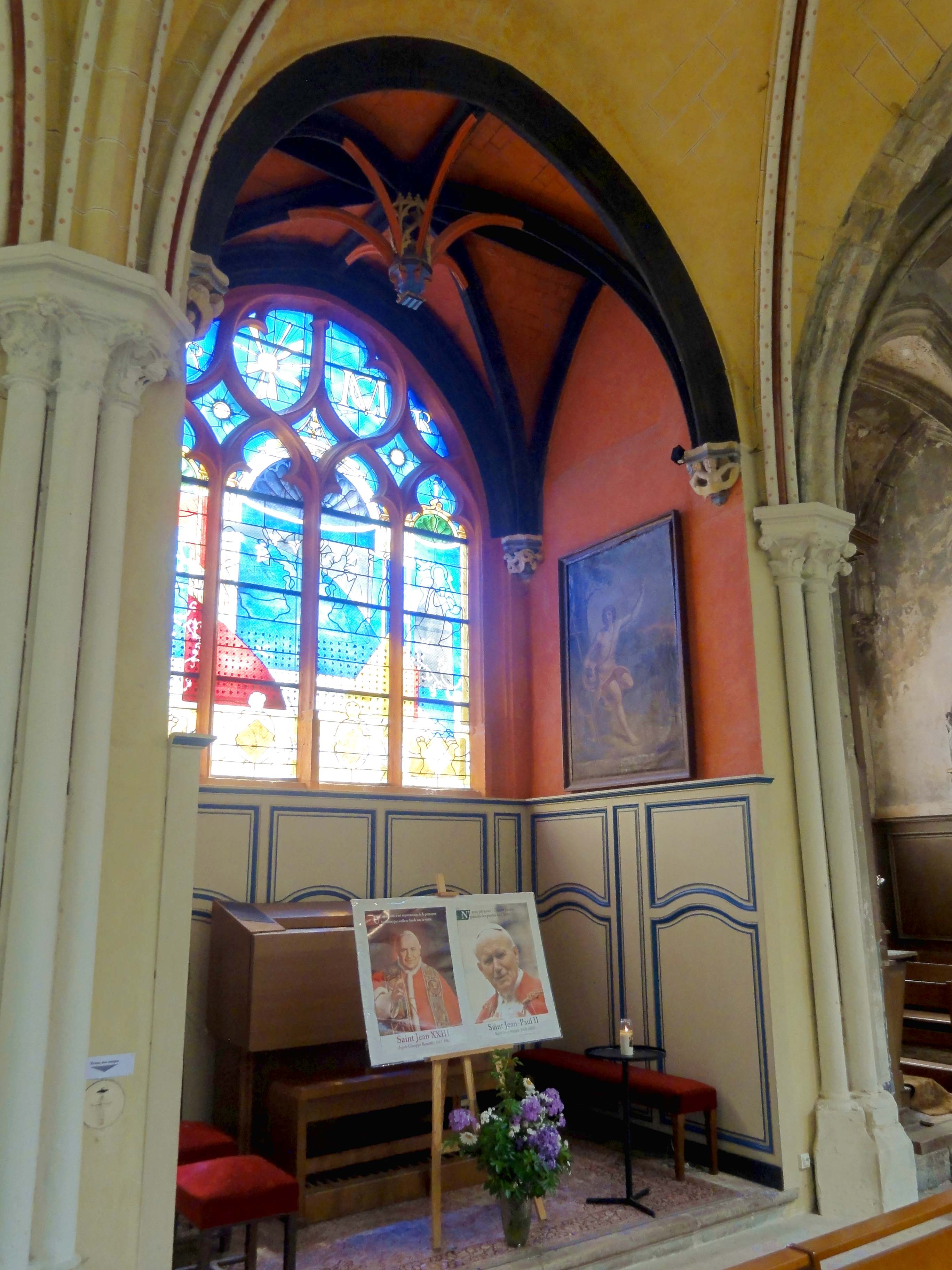 Voir titre.